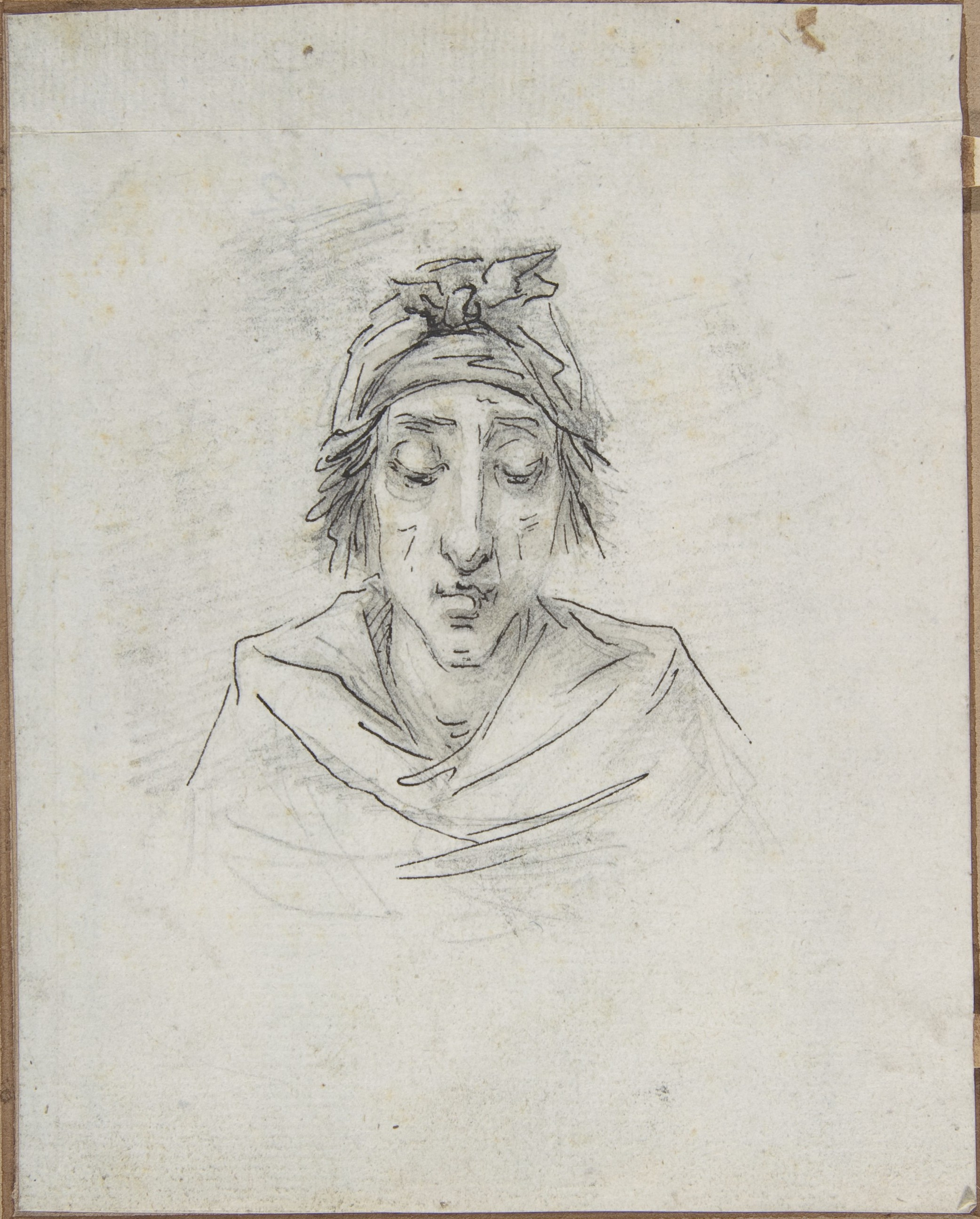 Drawing; Drawings